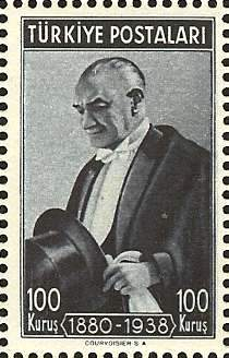 1940 yılında Türkiye Cumhuriyeti Posta İdaresince bastırılan bir posta pulu.